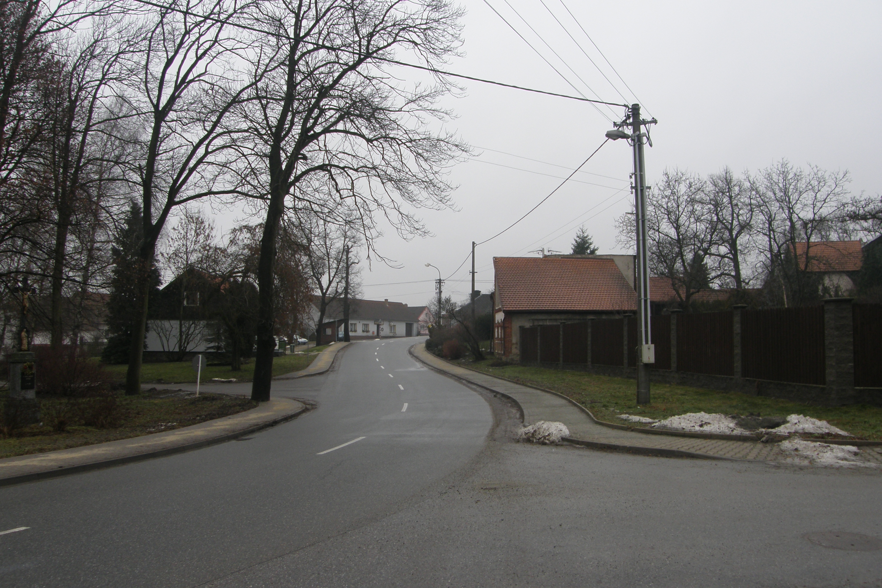 Světlá